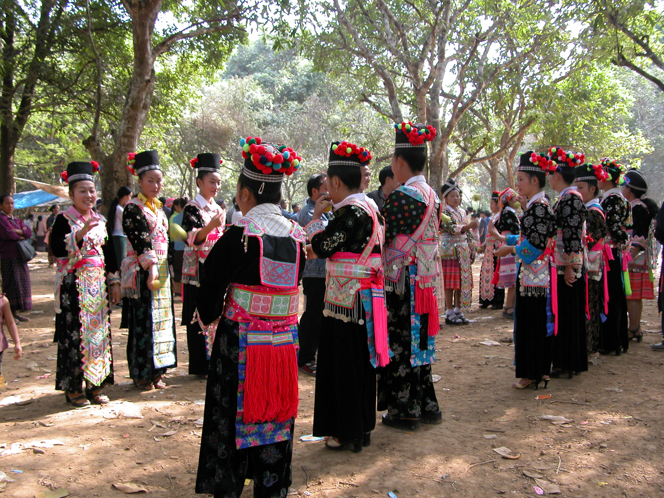 laos luang prabang, fete de rencontre hmong